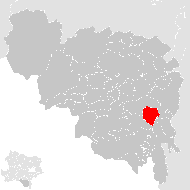 Bezirk Neunkirchen